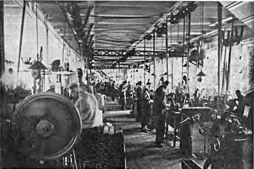 Fragnent hali maszyn.